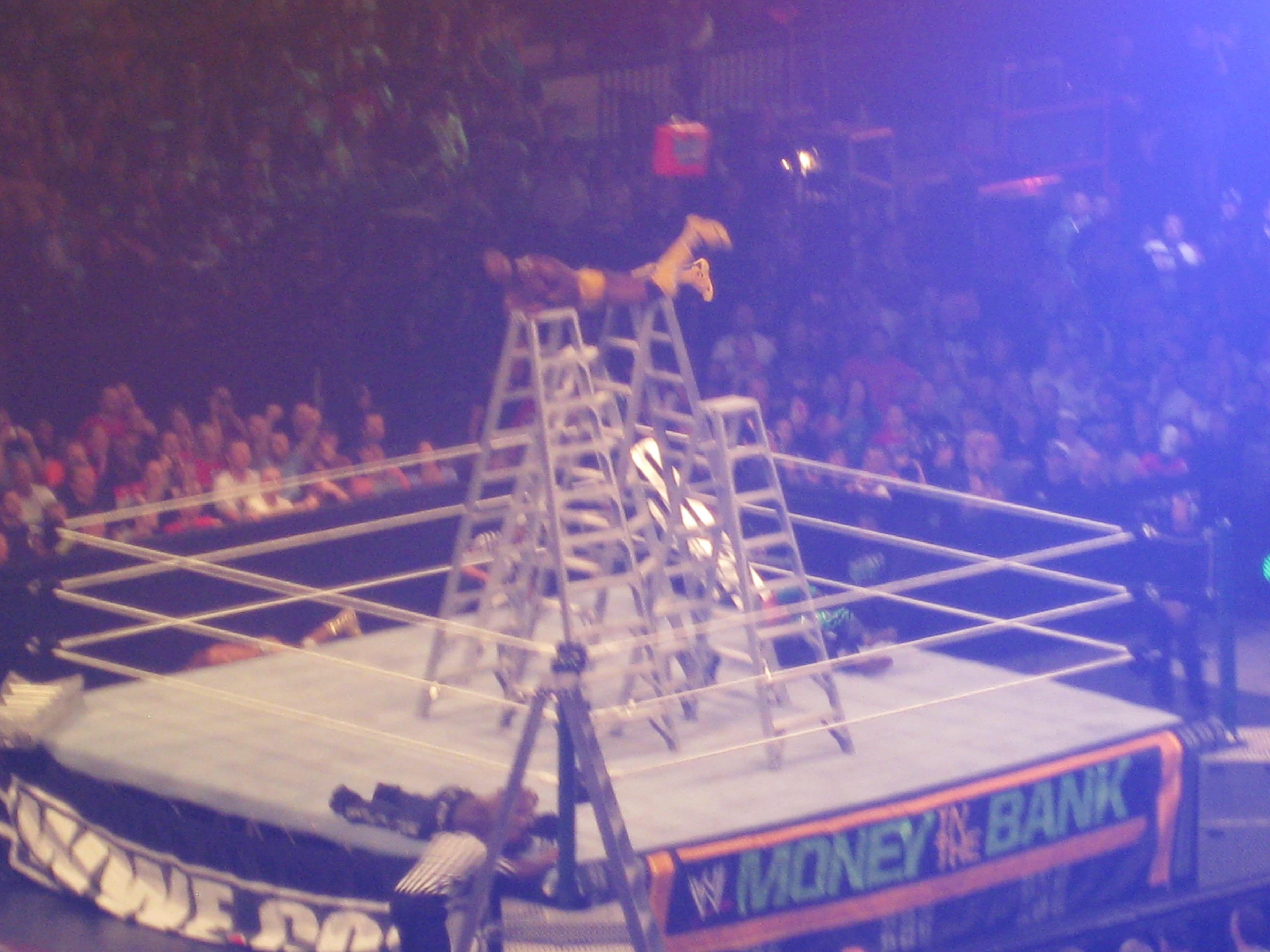 Kingston in MITB Ladder match